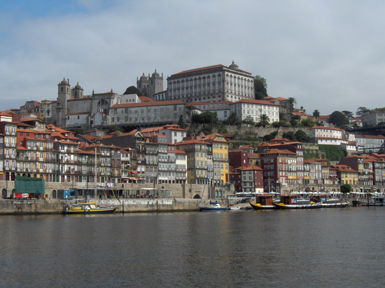 Ribeira, episcopal palace and cathedral; church in front : São Lourenço dos Grilos; Porto, Portugal